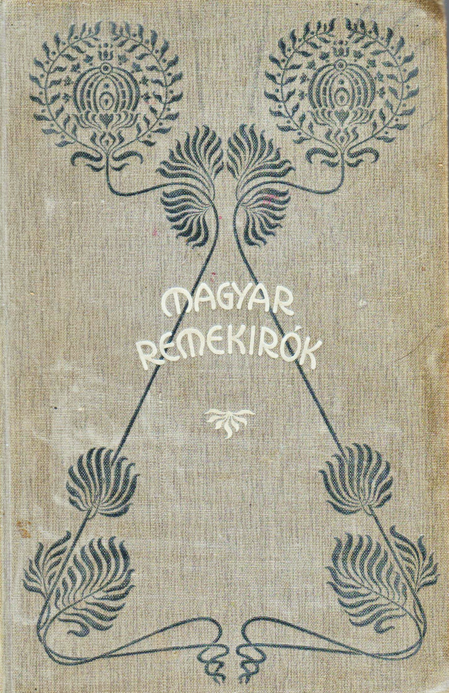 Magyar remekírók-könyvsorozat borítódísz, tervező nem ismert, 1900-as évek